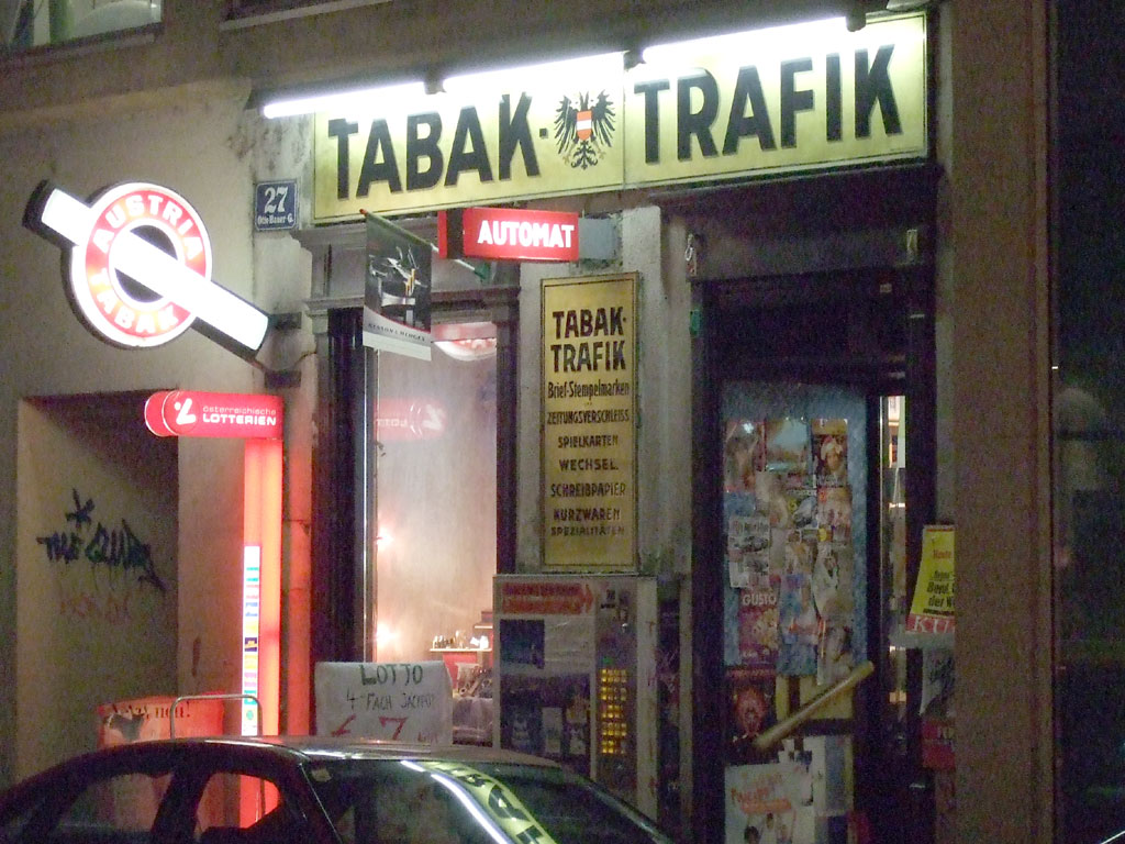 Tabak-Trafik in Wien / Vienna